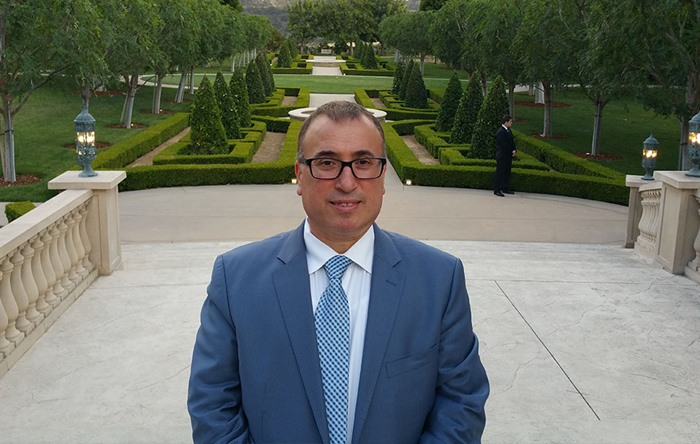 Murat Güzel